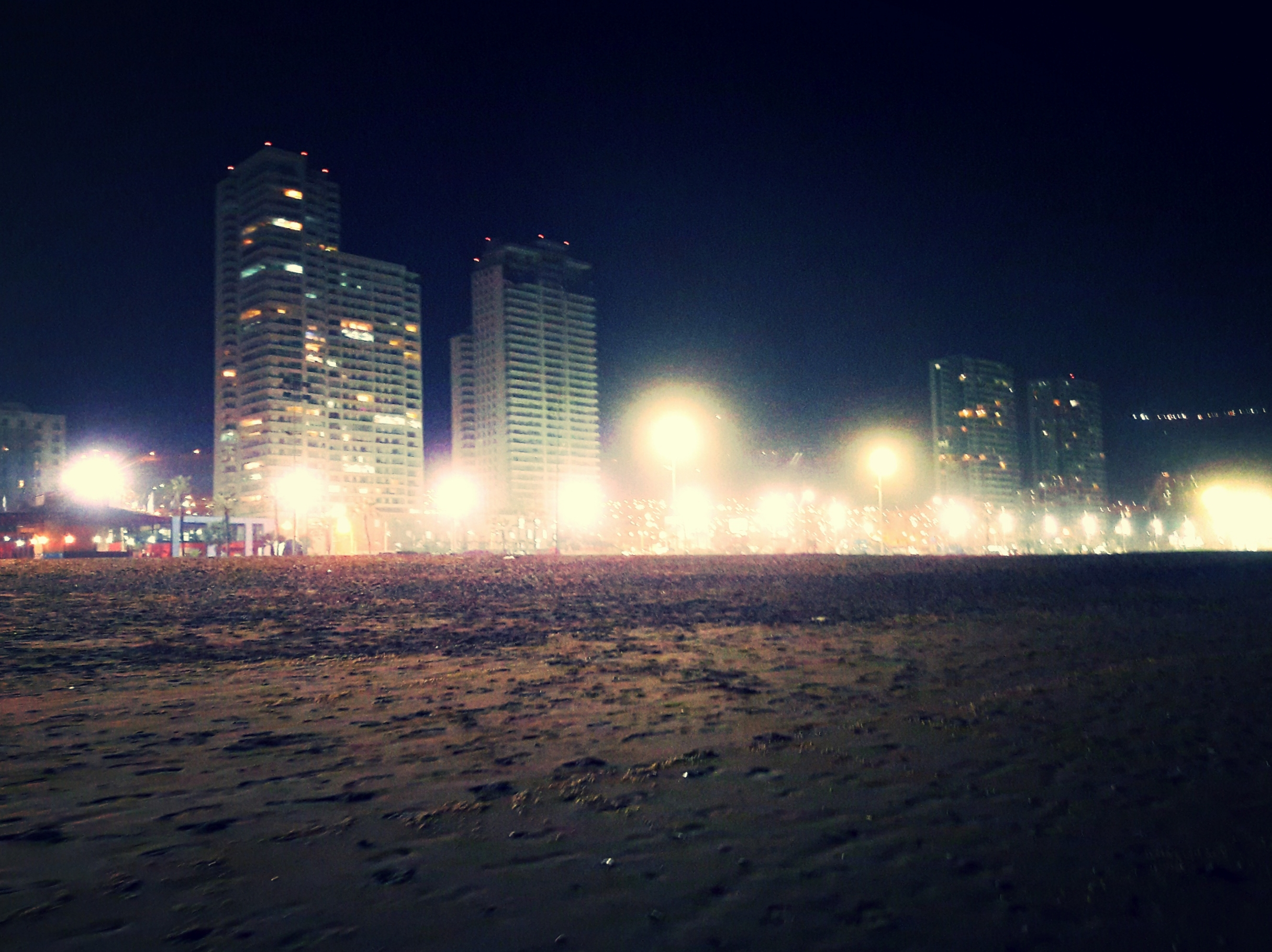 Edificio Mirador Playa Brava en la noche